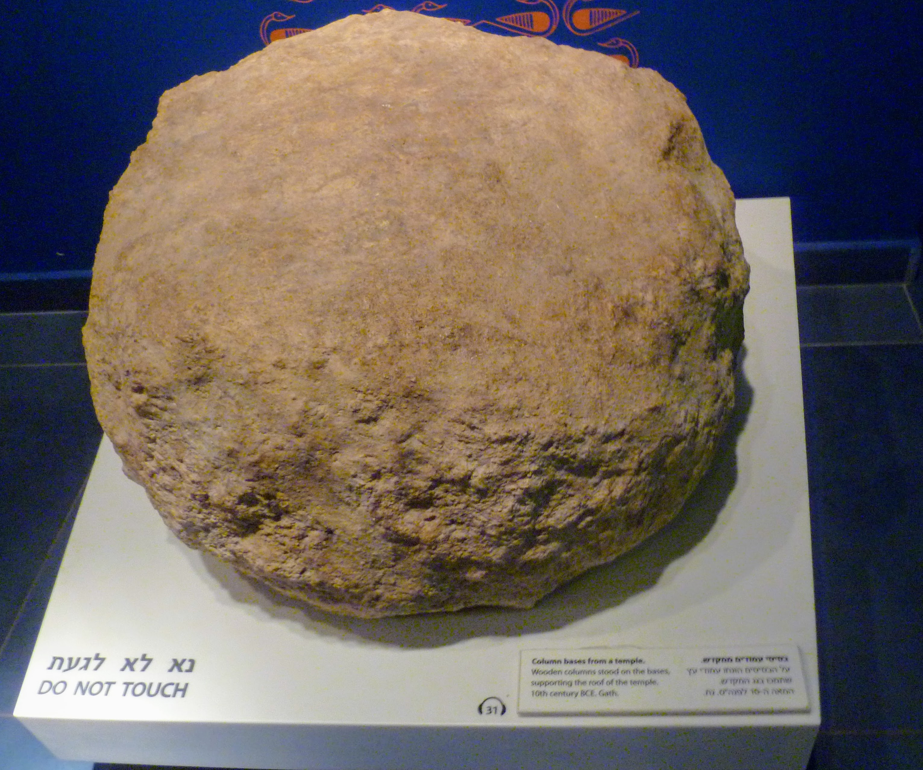 בסיסי עמודים ממקדש, המאה ה 10 לפנה"ס